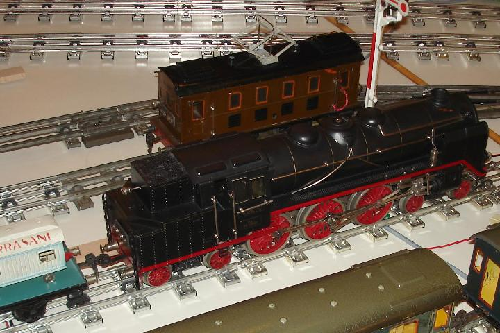 Tin-Plate Mittelleiter-Gleise der Spur II aus dem Hause Märklin an einer privaten aber öffentlich zugänglichen Modelleisenbahnausstellung.